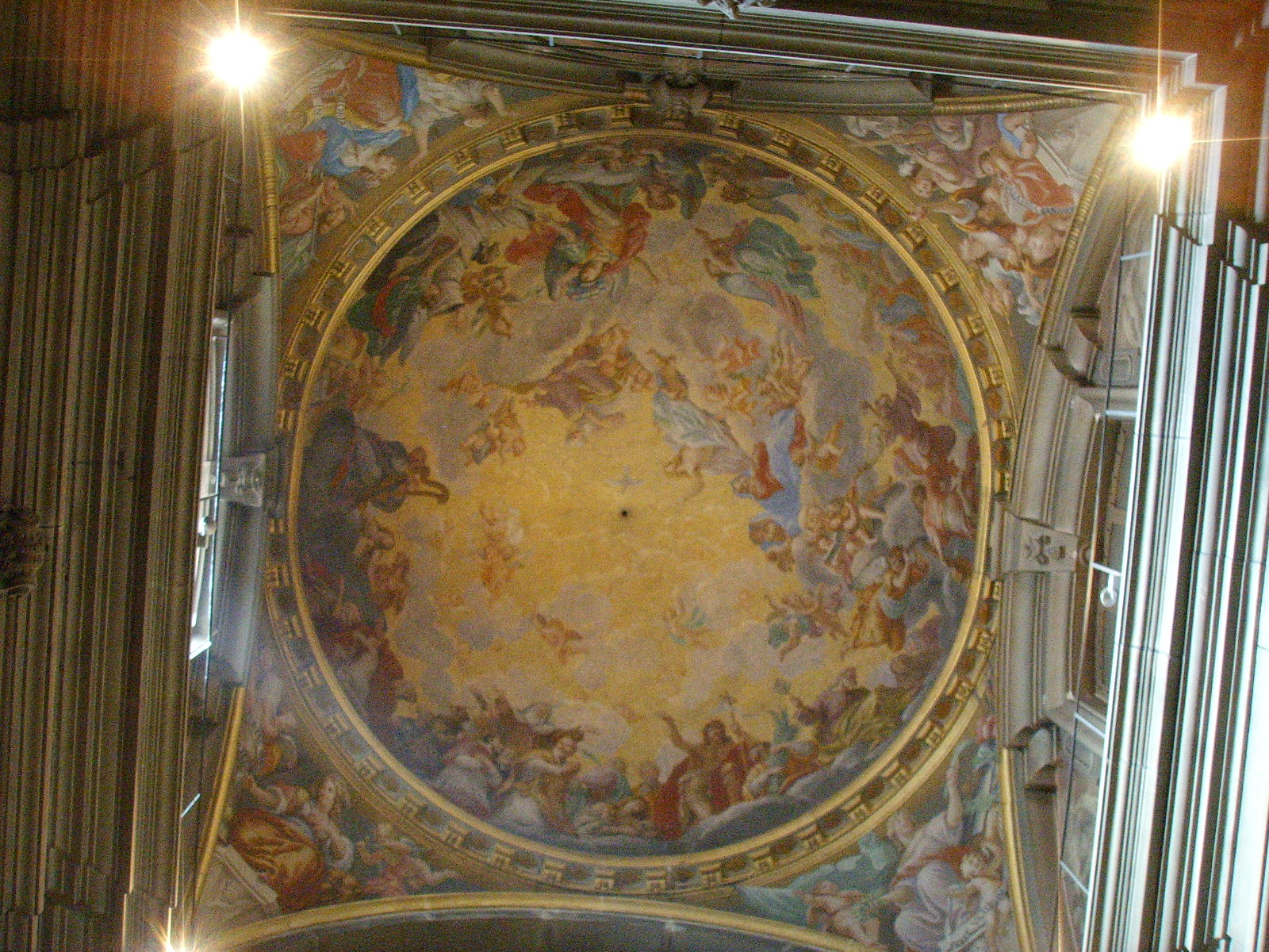 Chiesa di san gaetano, cupola del coro, filippo maria galletti, san michele arcangelo presenta san gaetano alla trinità